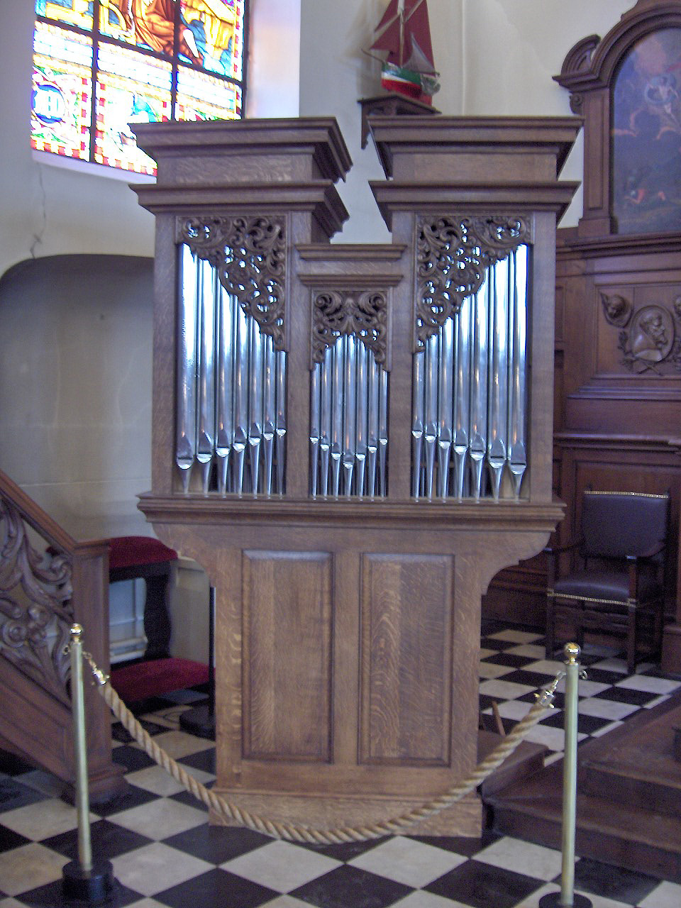 The new organ in the Kapucijnenkerk; Ostend, Belgium